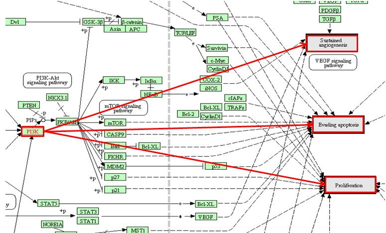 Ruta de la PI3K y su relación con el cáncer.